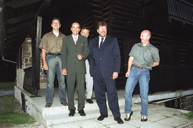 Jože Kolenc s Krkovičem, Janšo, Beznikom ter Bavčarjem.